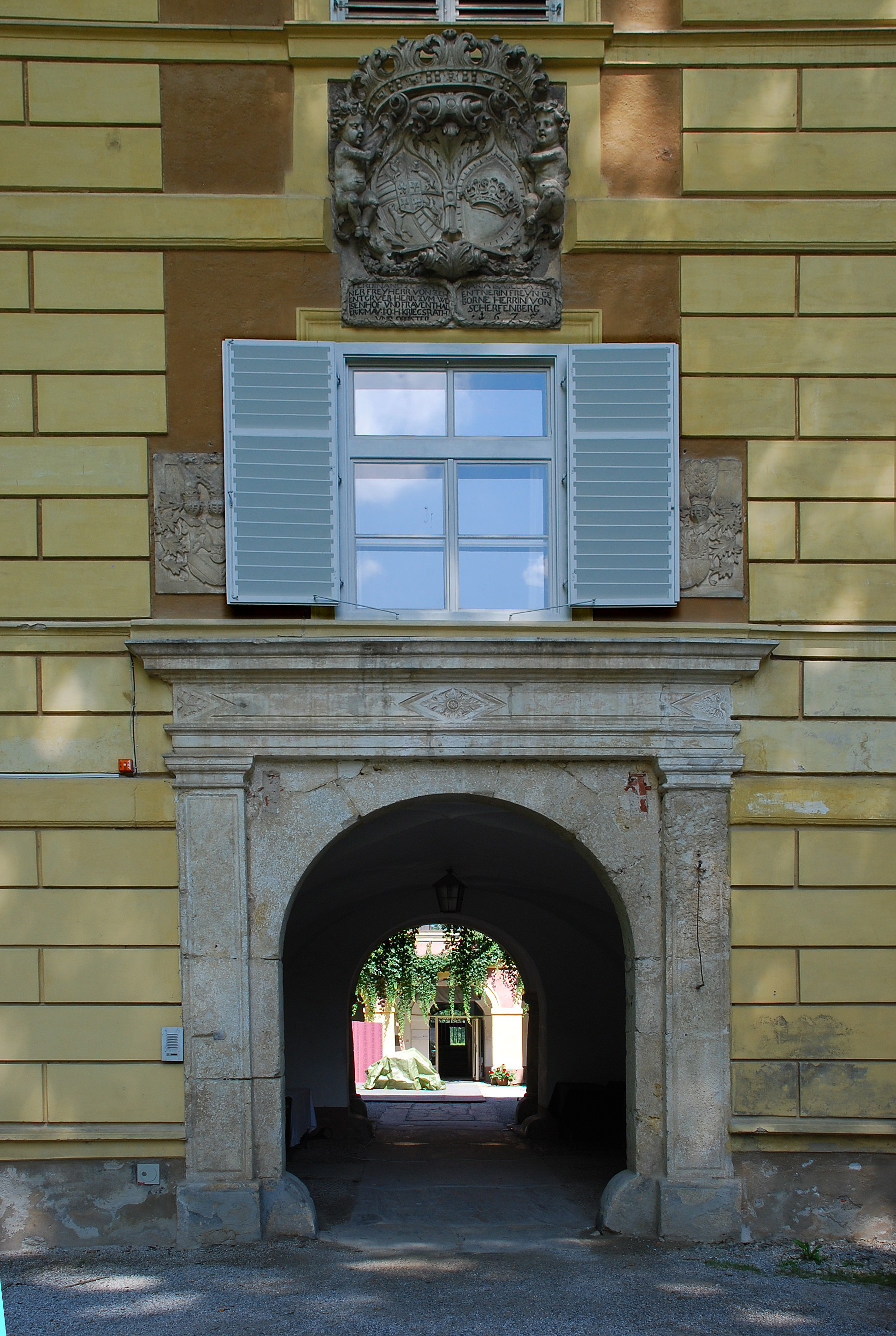 Schloss Frauental, Eingang Object location46° 48′ 49.09″ N, 15° 14′ 40.04″ E